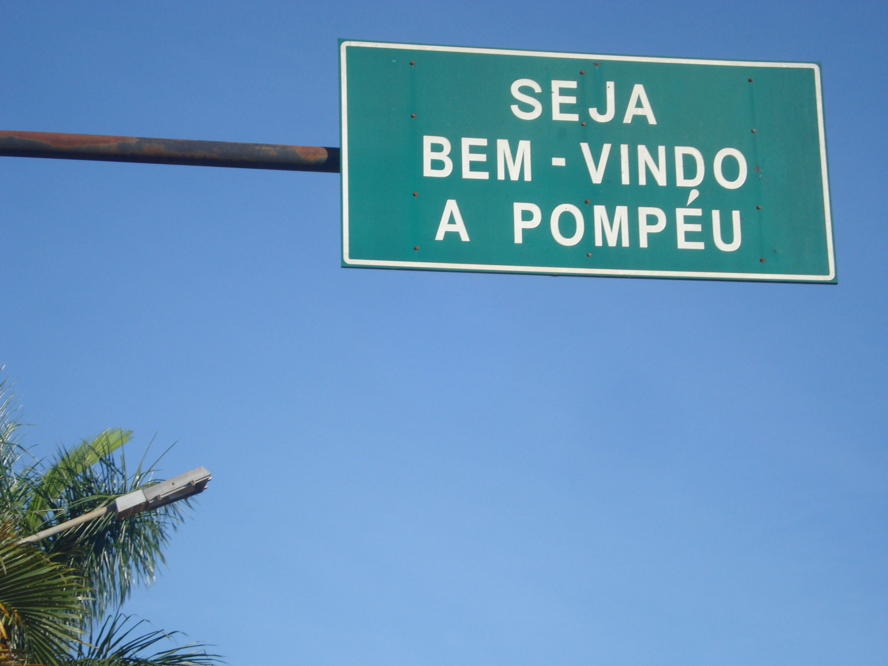 Placa de boas-vindas à cidade de Pompéu, localizada na entrada do município.